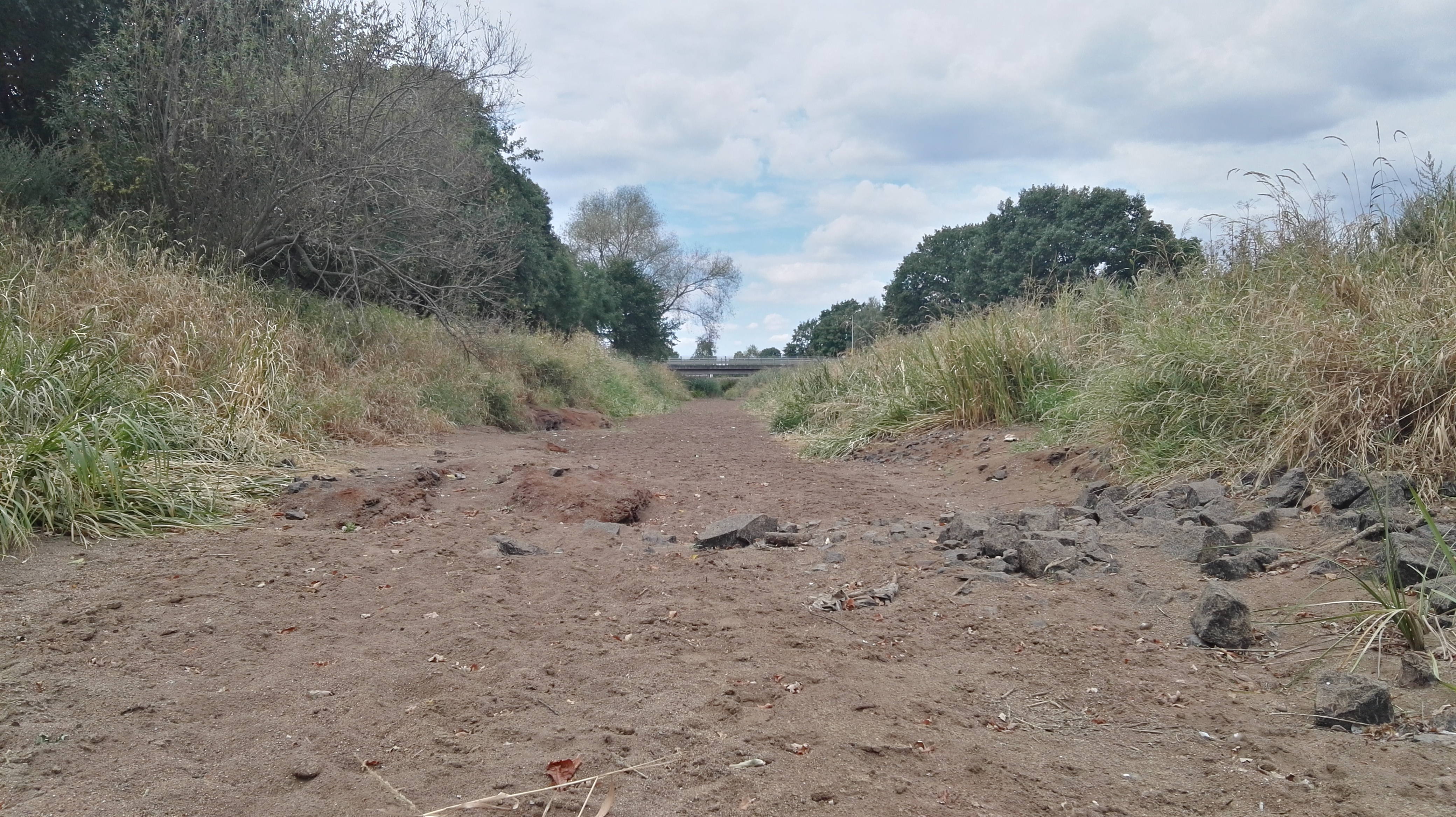 Ausgetrocknete Schwarze Elster bei Senftenberg; im Hintergrund die Elsterbrücke Knappenstraße